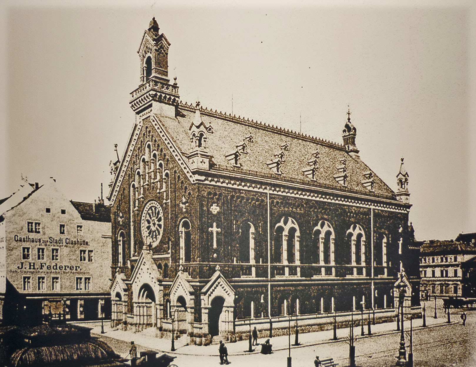 Ehemalige Reformierte Kirche in Dresden am Friedrichsring (Dr.-Külz-Ring) (Architekt: Harald Julius von Bosse)